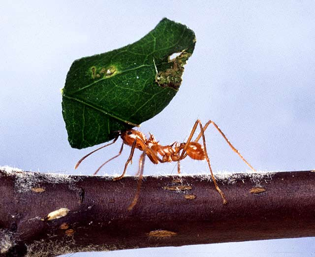 Ameise, public domain von - USDA photo courtesy of